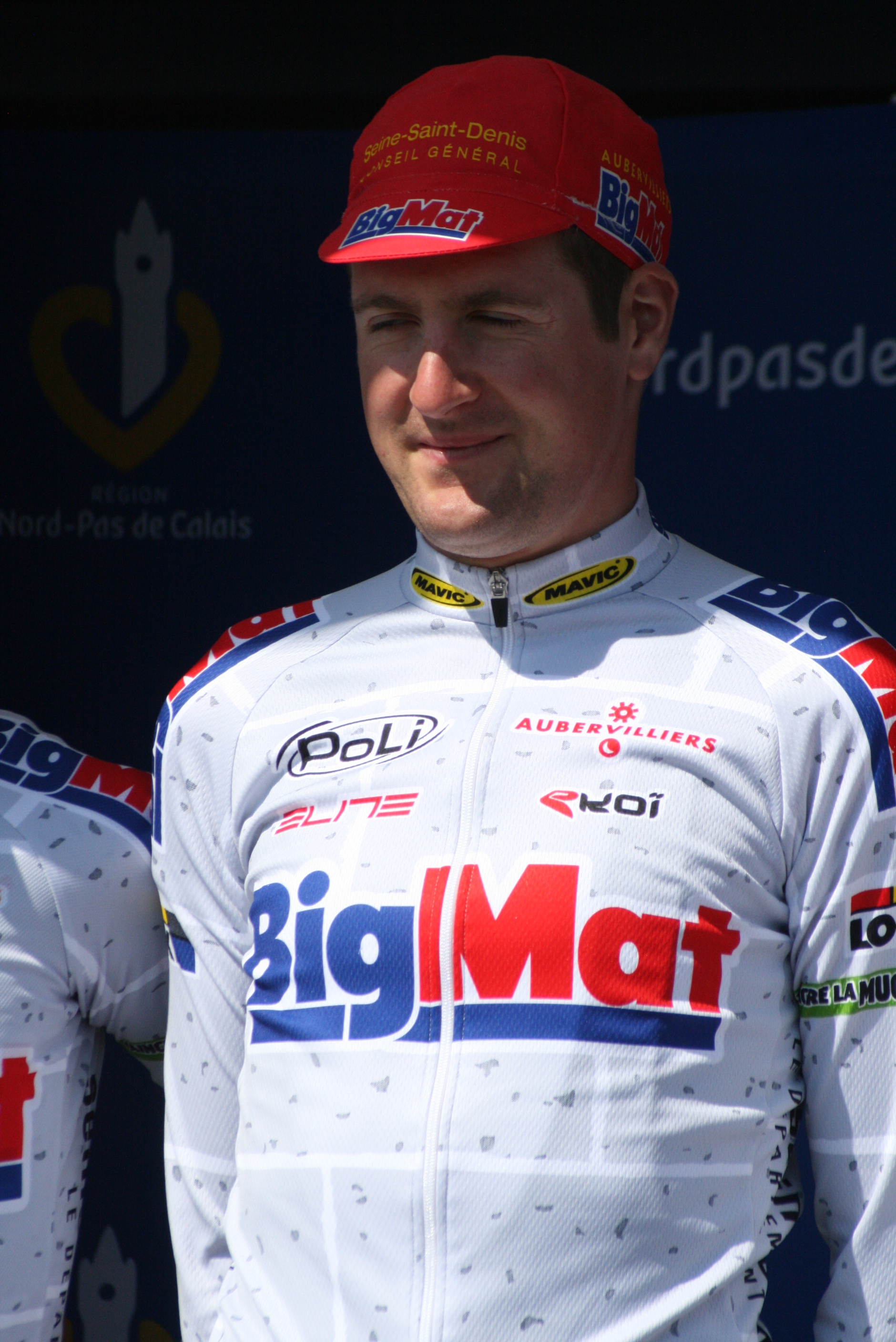 Présentation des coureurs au départ de la première étape Nicolas Bazin